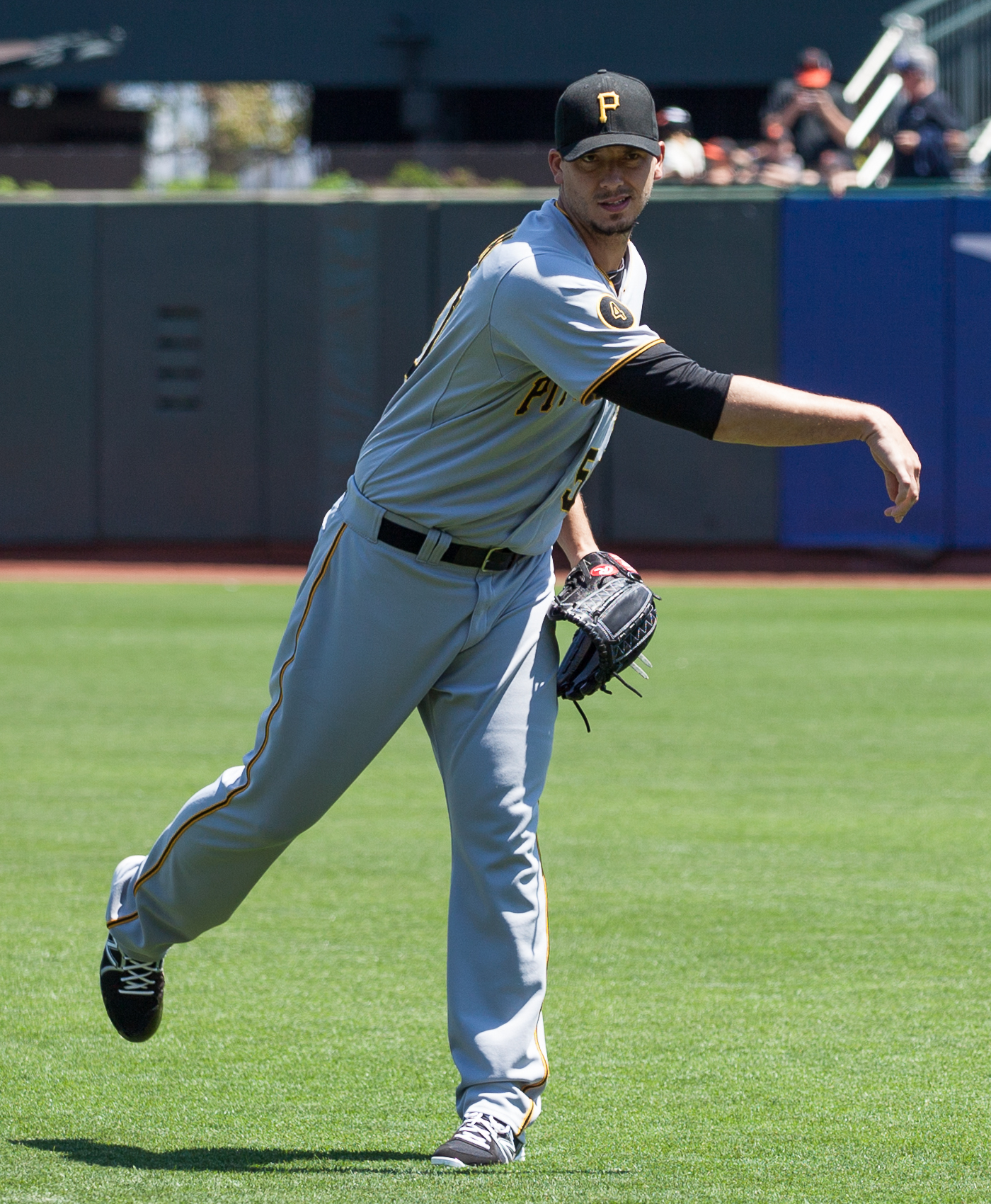 Charlie Morton